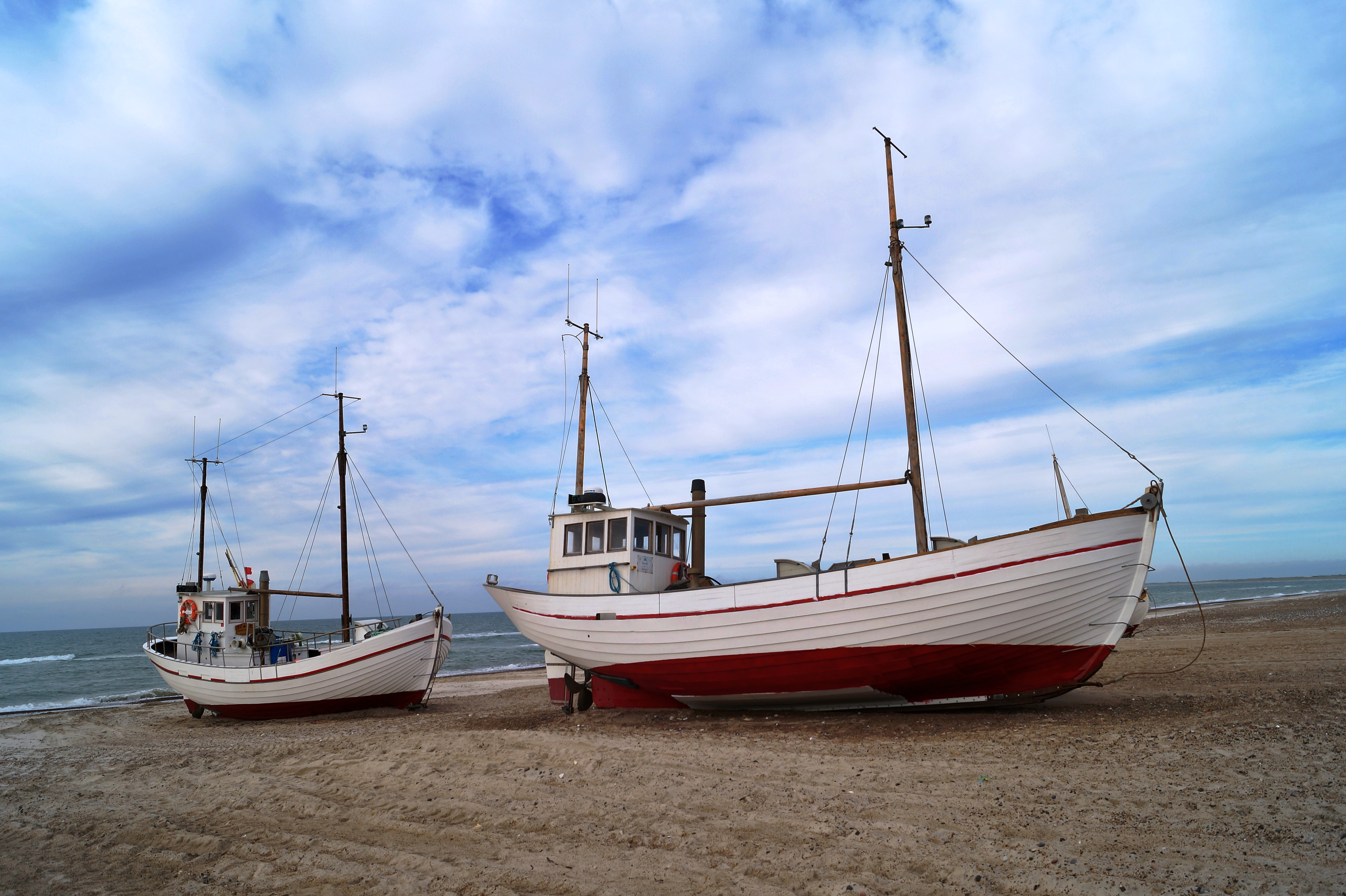 2 Fischerbote am Slettestrand